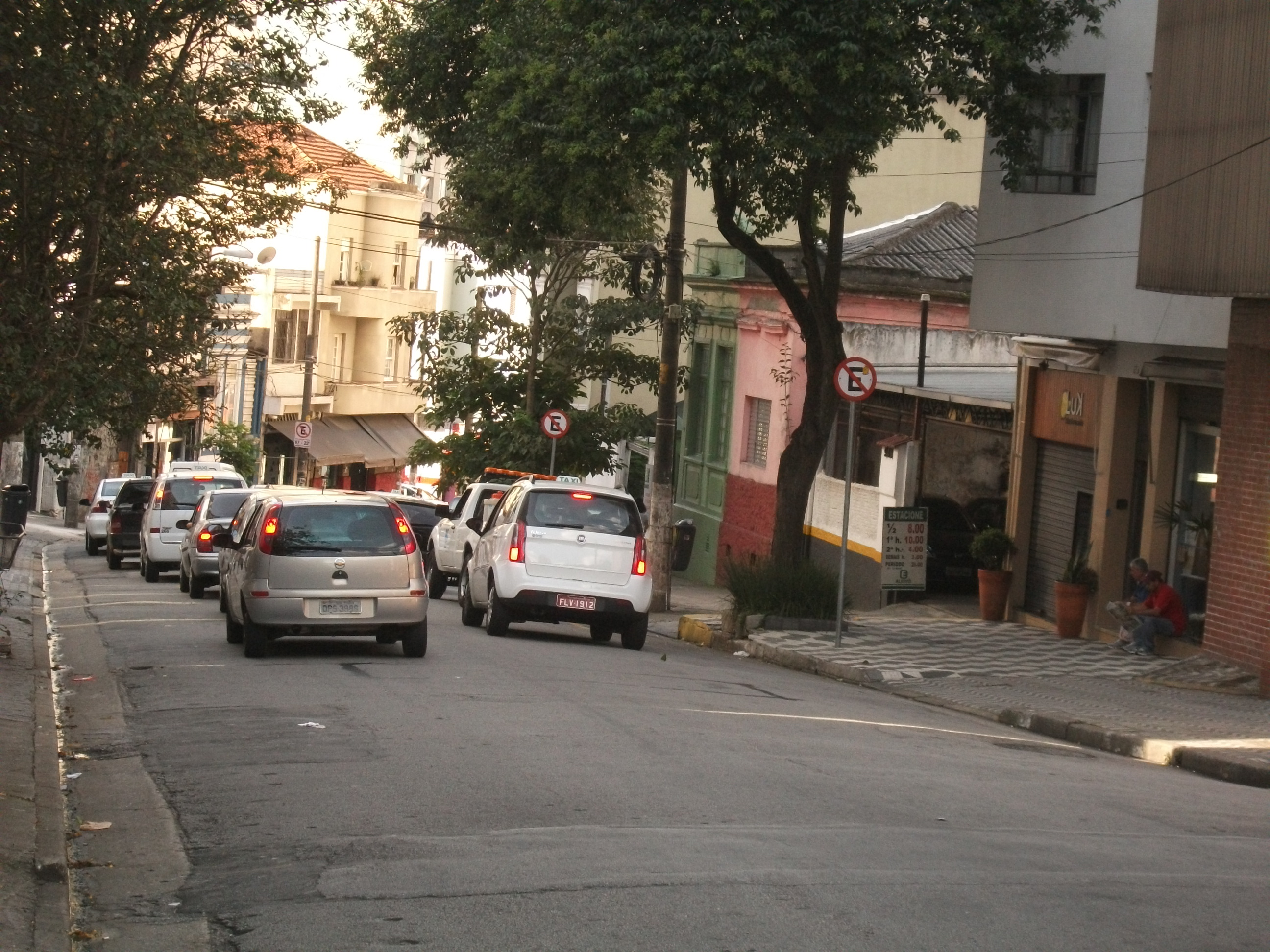 Trecho da Rua Frei Caneca no distrito da Consolação em São Paulo - SP.